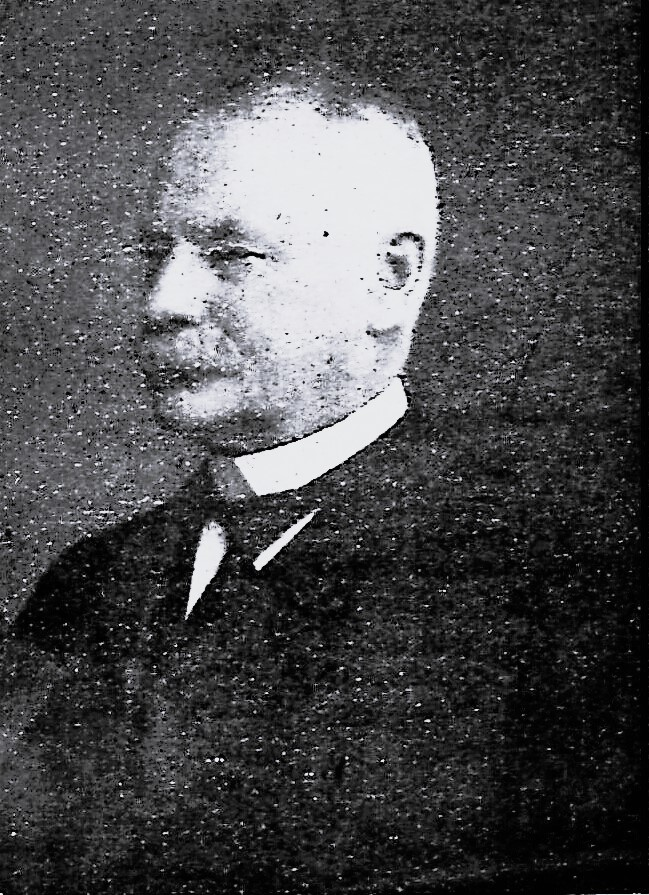 Prof. Dr. Georg Otto Bussenius.